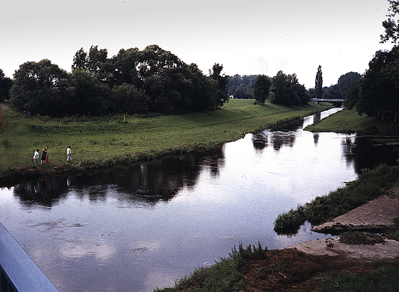 Начало Дуная.